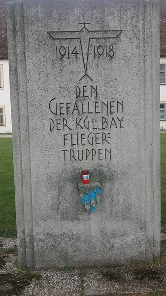 Denkmal der königlichen bayrischen Fliegergruppe 1. Weltkrieg in Schloss Oberschleißheim